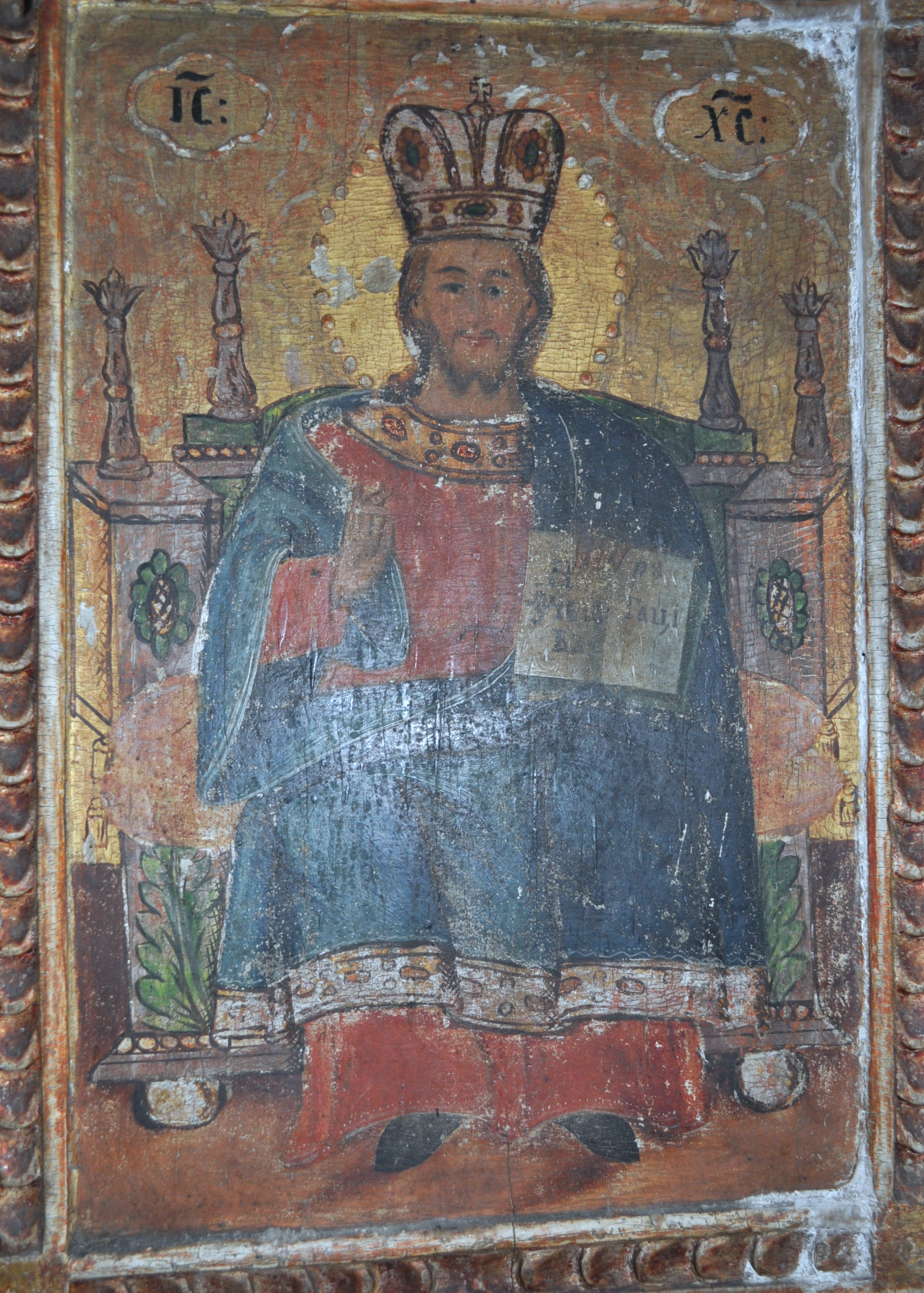 Biserica de lemn "Buna Vestire" din Ciungani, județul Hunedoara